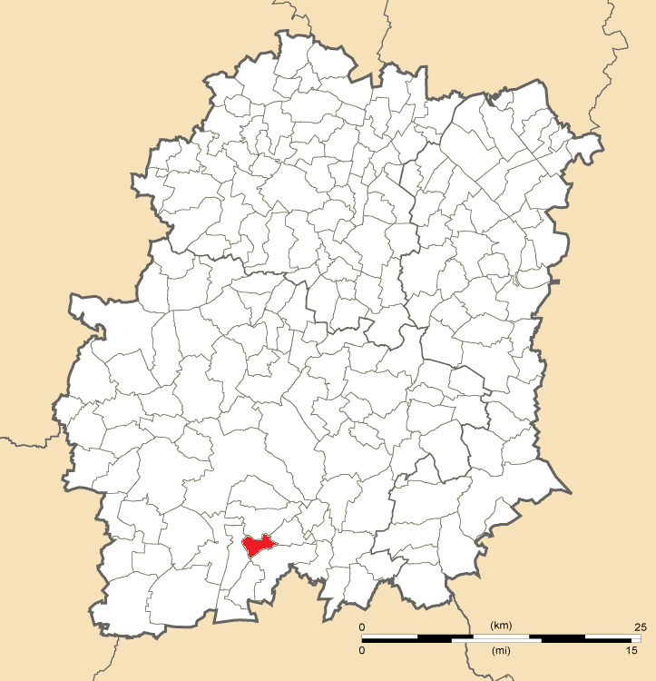 Carte de position de Fontaine-la-Rivière en Essonne (91)